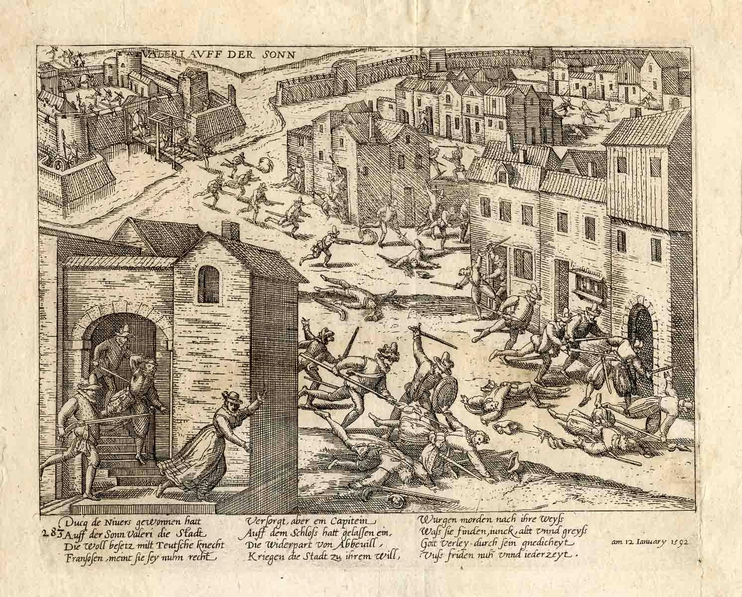 Massacre à Saint Valéri sur Somme (et non pas "rue de la Somme"). Gravure par Frans Hoggenberg (1535-1590) datée du 12 janvier 1592 (en bas à droite). Il s'agit probablement d'une des prises de la ville par l'un ou l'autre camp lors des guerres de religion du XVIe siècle : la ville a été prise par les huguenots du capitaine Cocqueville en juin 1558 et reprise peu après par les royalistes du maréchal de Cossé.